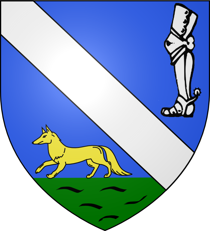 d'azur à la bande d'argent accosté en chef d'une jambe toute cuirassée et éperonnée du même, et en pointe d'un renard passant d'or sur une terrasse de sinople.